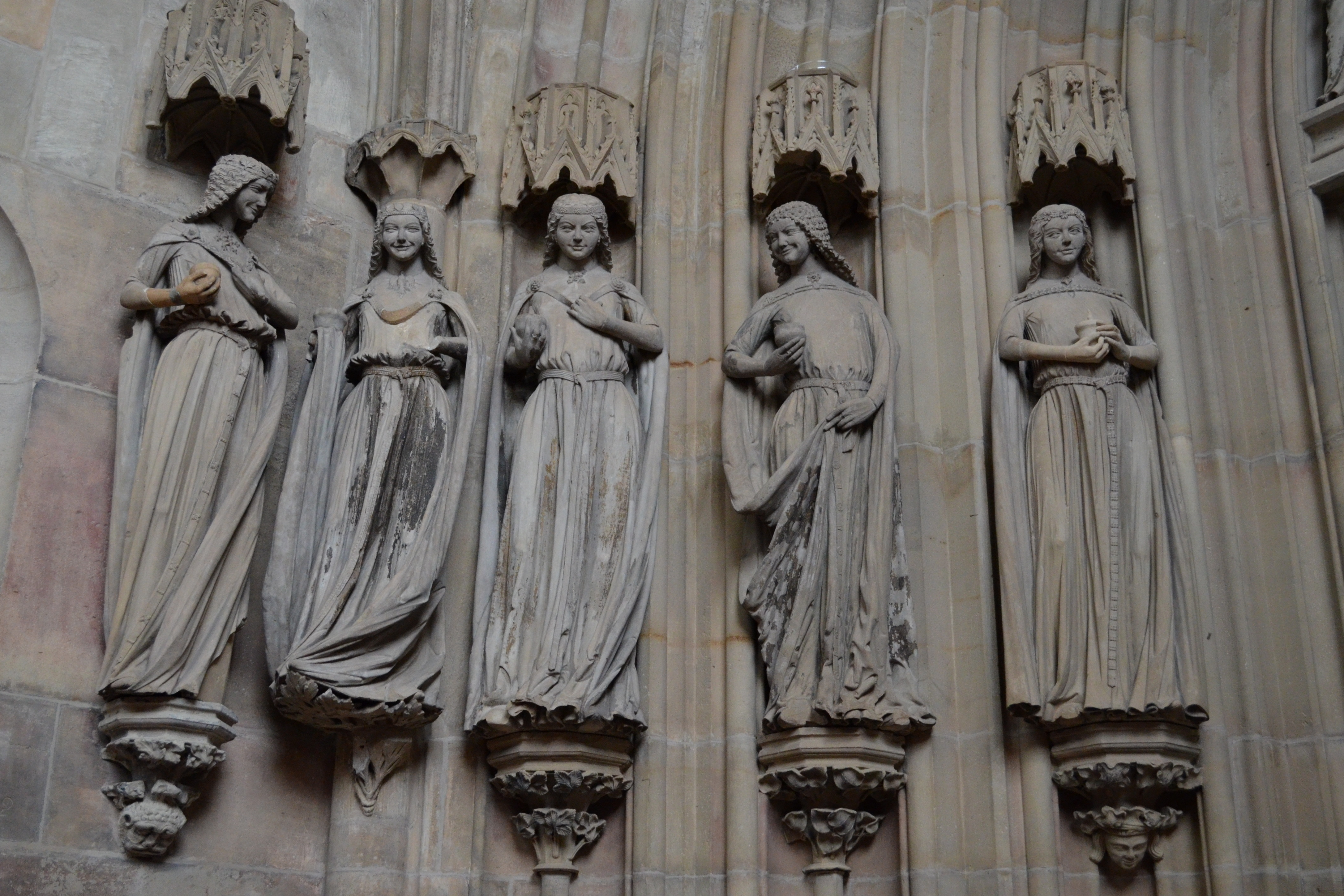 Maagdenburg, beelden wijze maagden